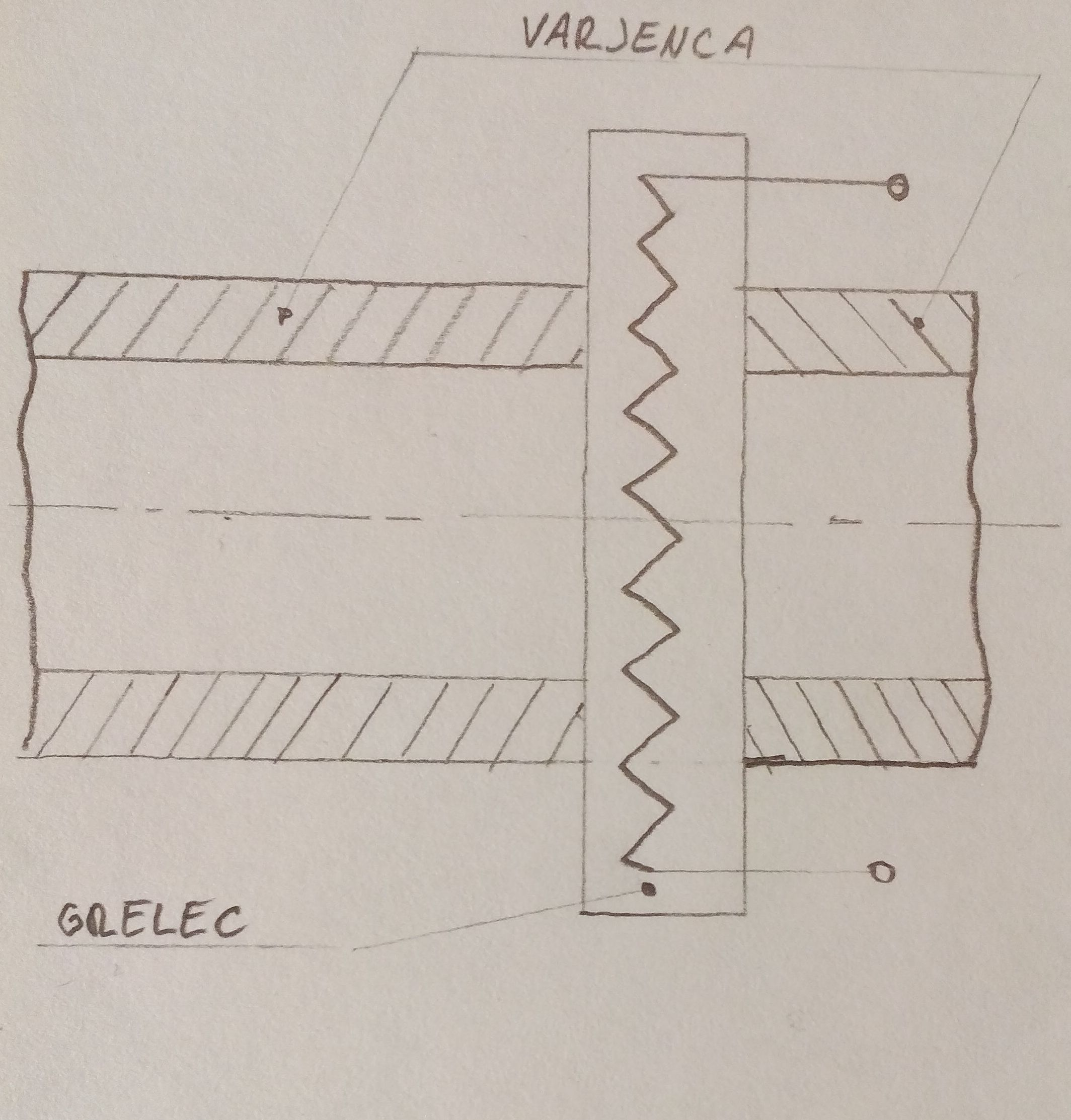 Prikaz varjenja dveh varjencev z grelcem